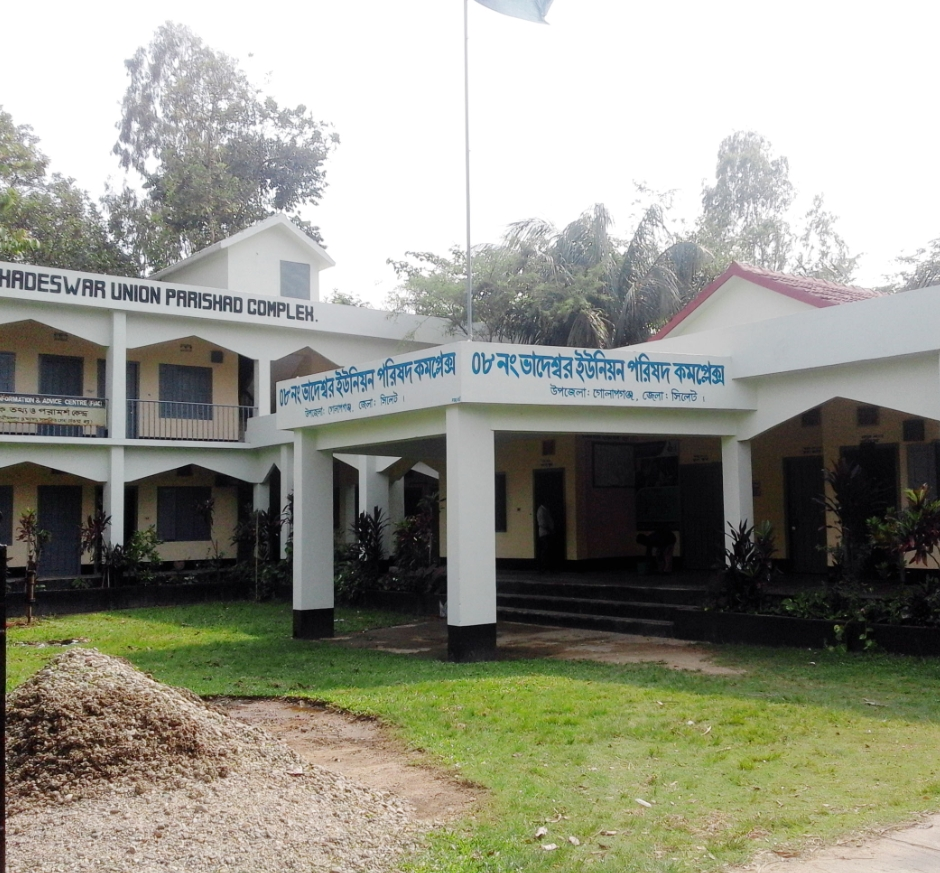 ৮নং ভাদেশ্বর ইউনিয়ন পরিষদ